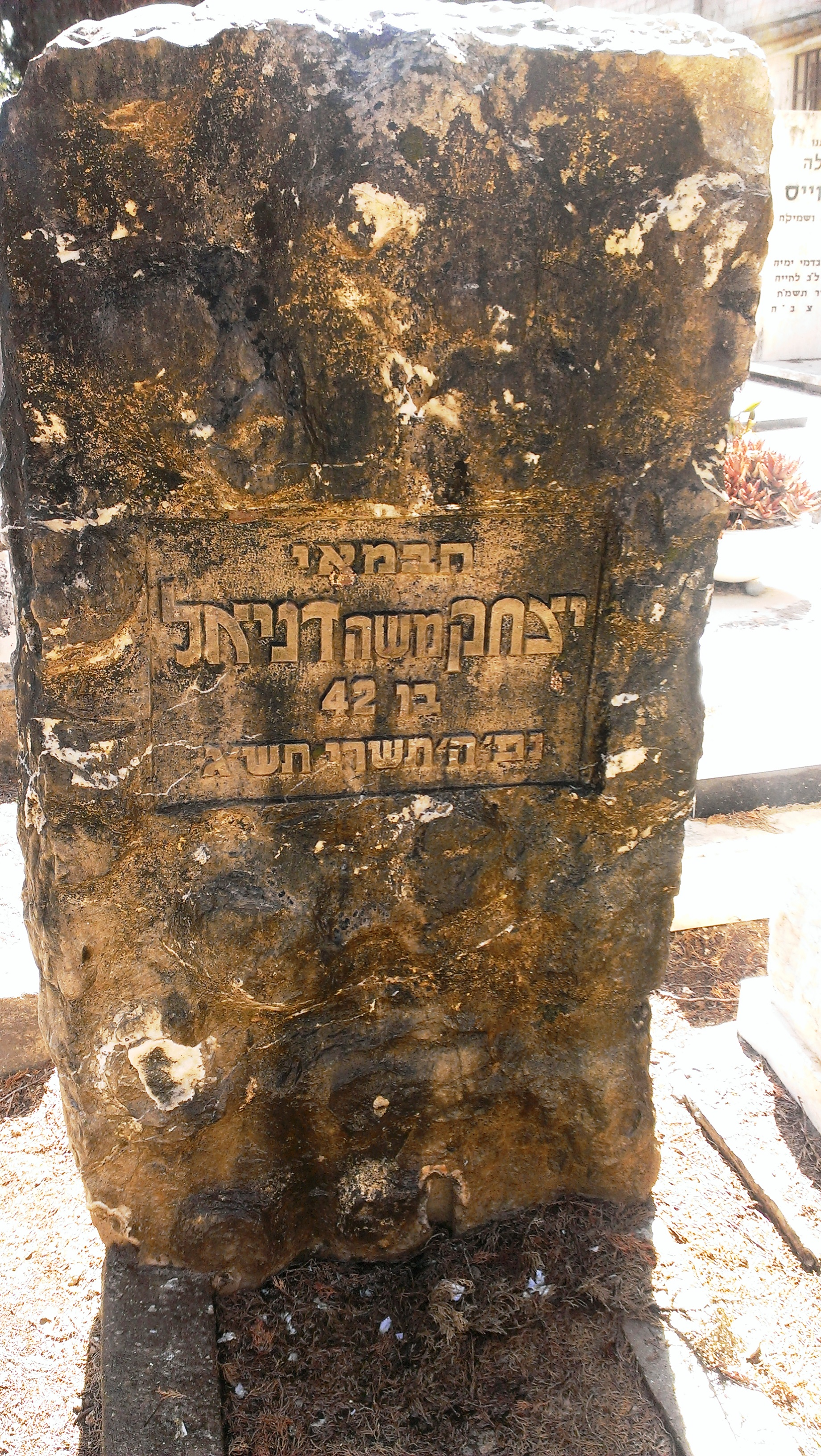 קברו של במאי והמחזאי יצחק משה דניאל בבית העלמין בנחלת יצחק